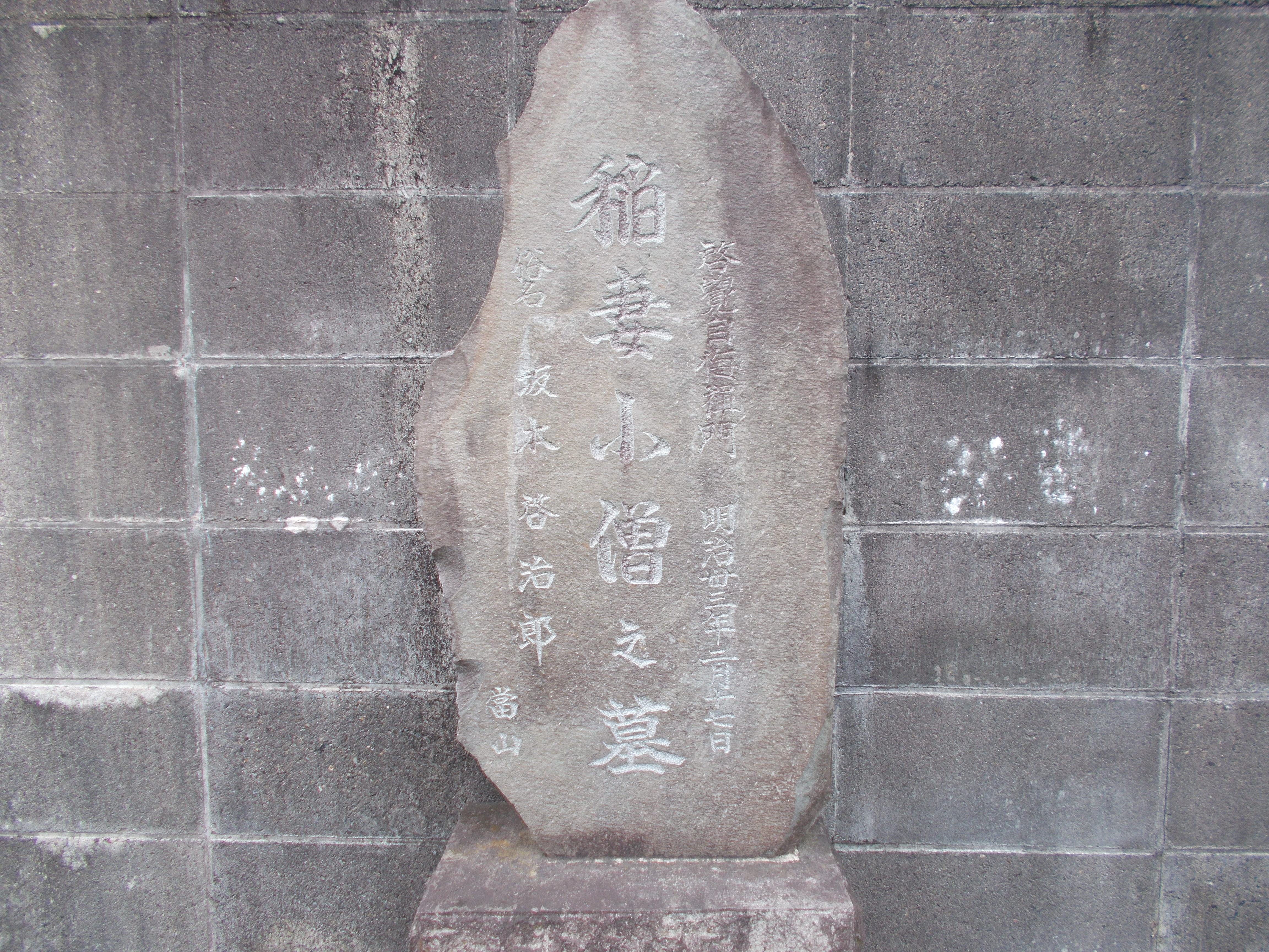 新宿区四谷の長善寺にある稲妻小僧の墓